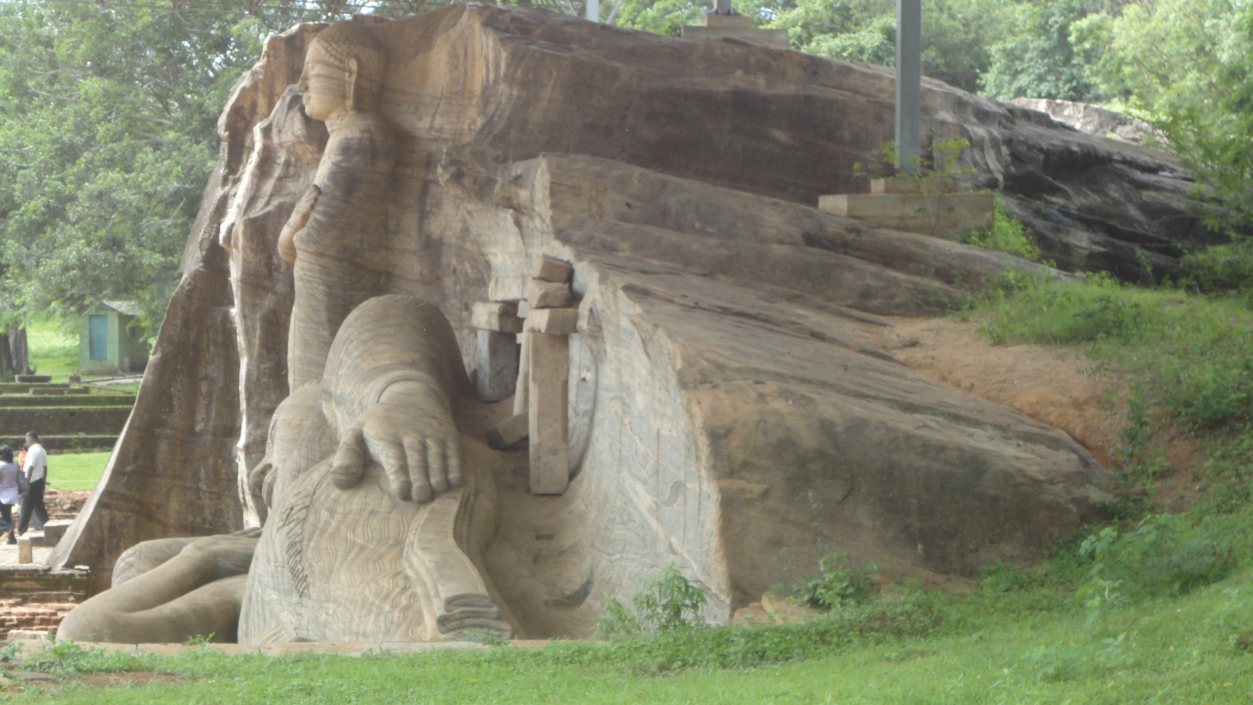 සිංහල: බුදු පිලිම කළු ගල් කුලකින් නෙලා ඇති අයුරු